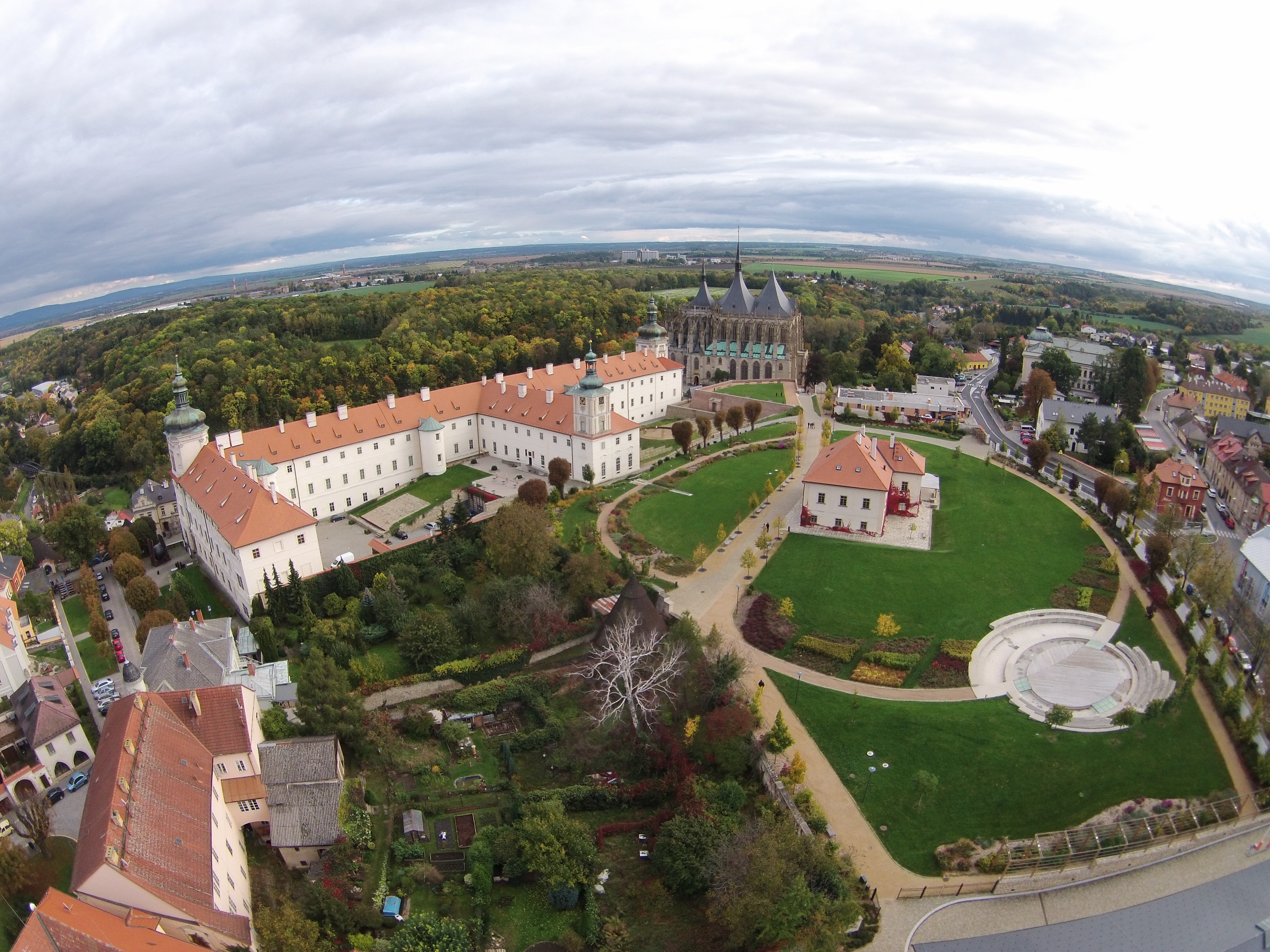 Kutná Hora. Česká republika.